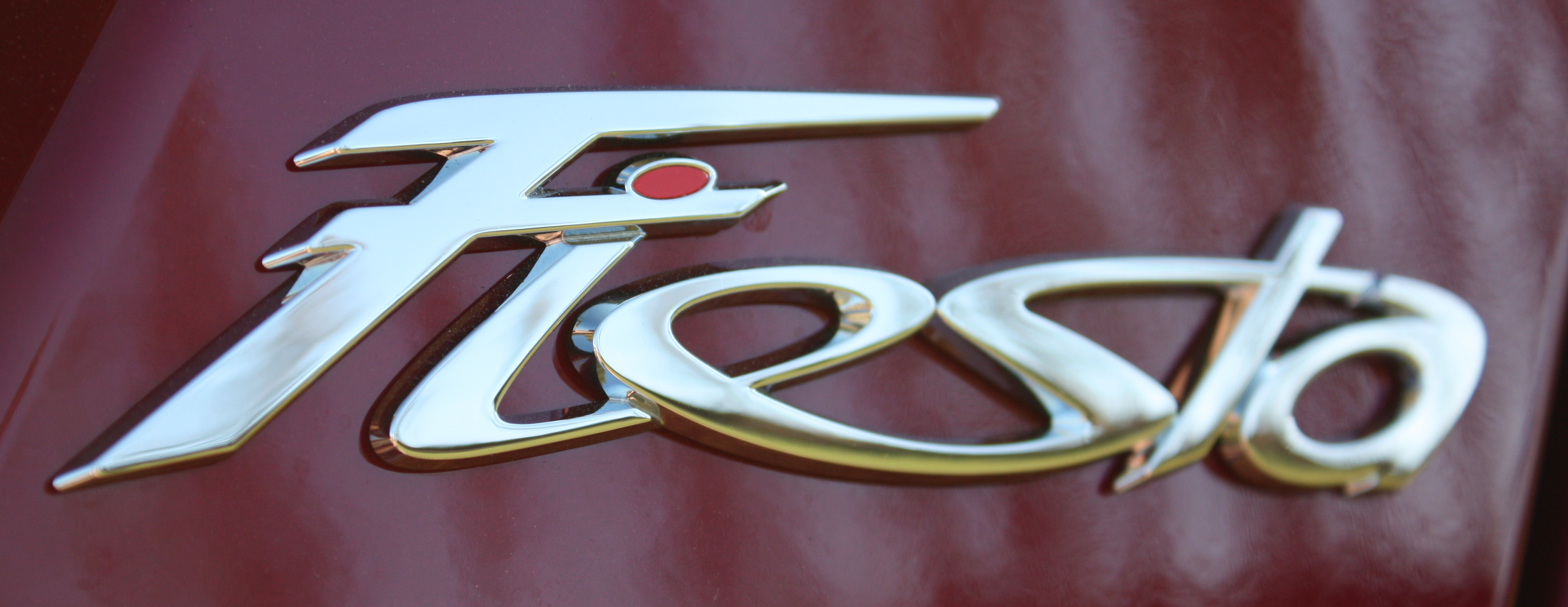 Schriftzug des Ford Fiesta. Modellreihe 2008. Lack-Farbe: Hot Magenta.